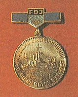 Medalle FDJ-Auftrag IX Parteitag